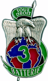 Insigne de la 3ième batterie du 61e RA